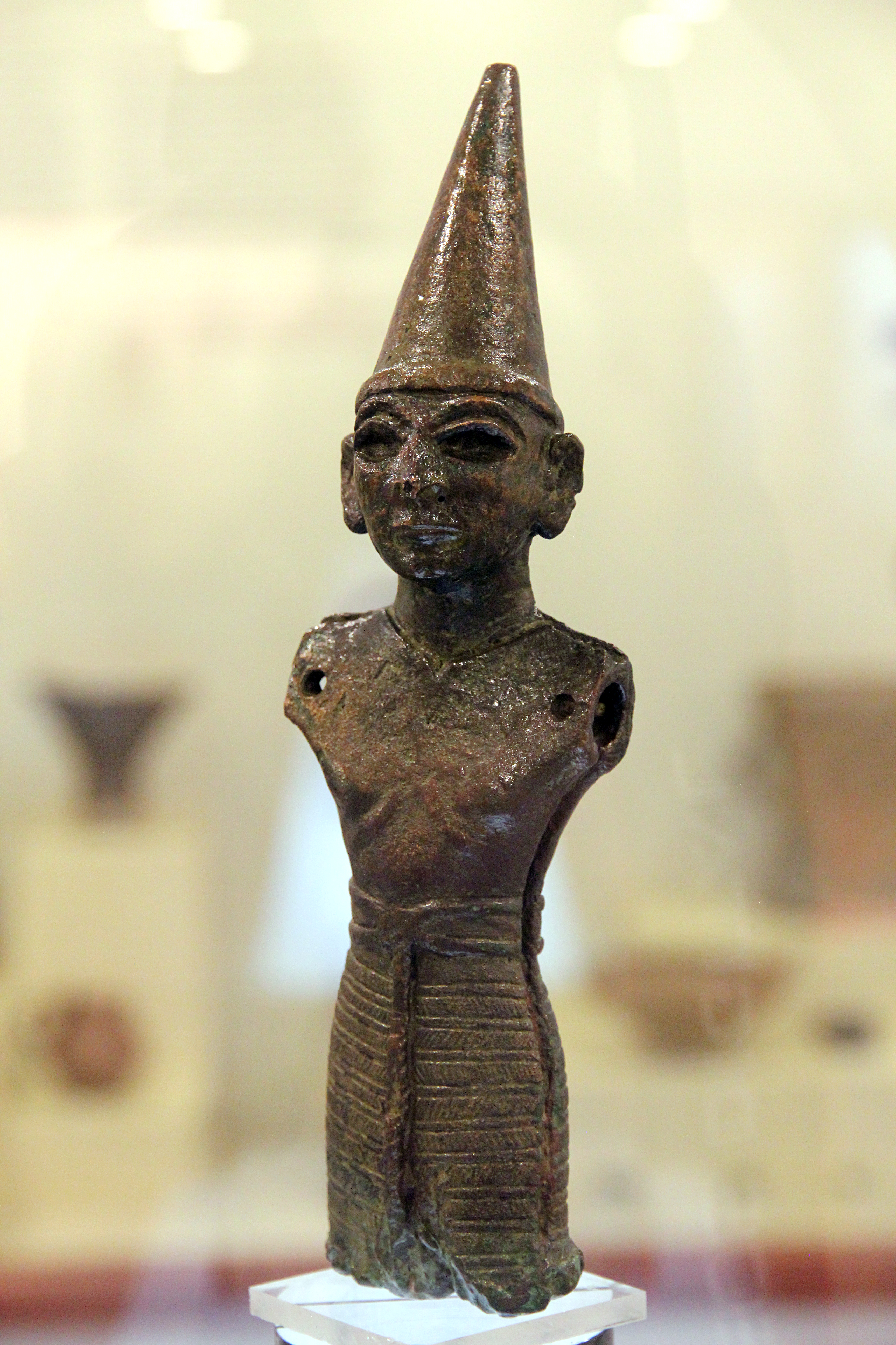 Bronzefigurine des Wettergottes im Archäologischen Museum von Amasya, Nordtürkei